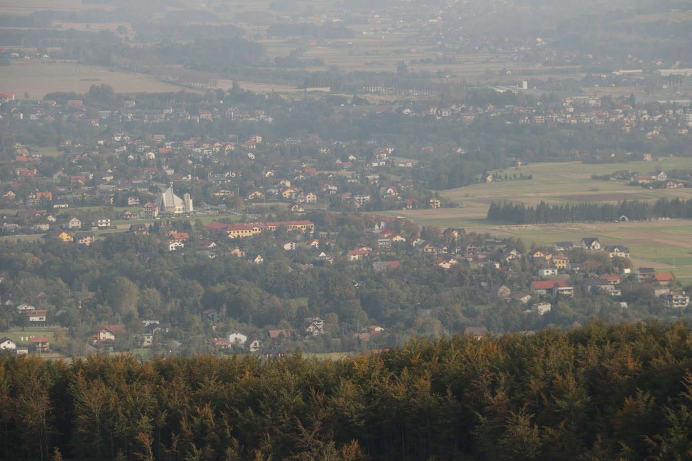 Widok na Roczyny od strony Złotej Górki